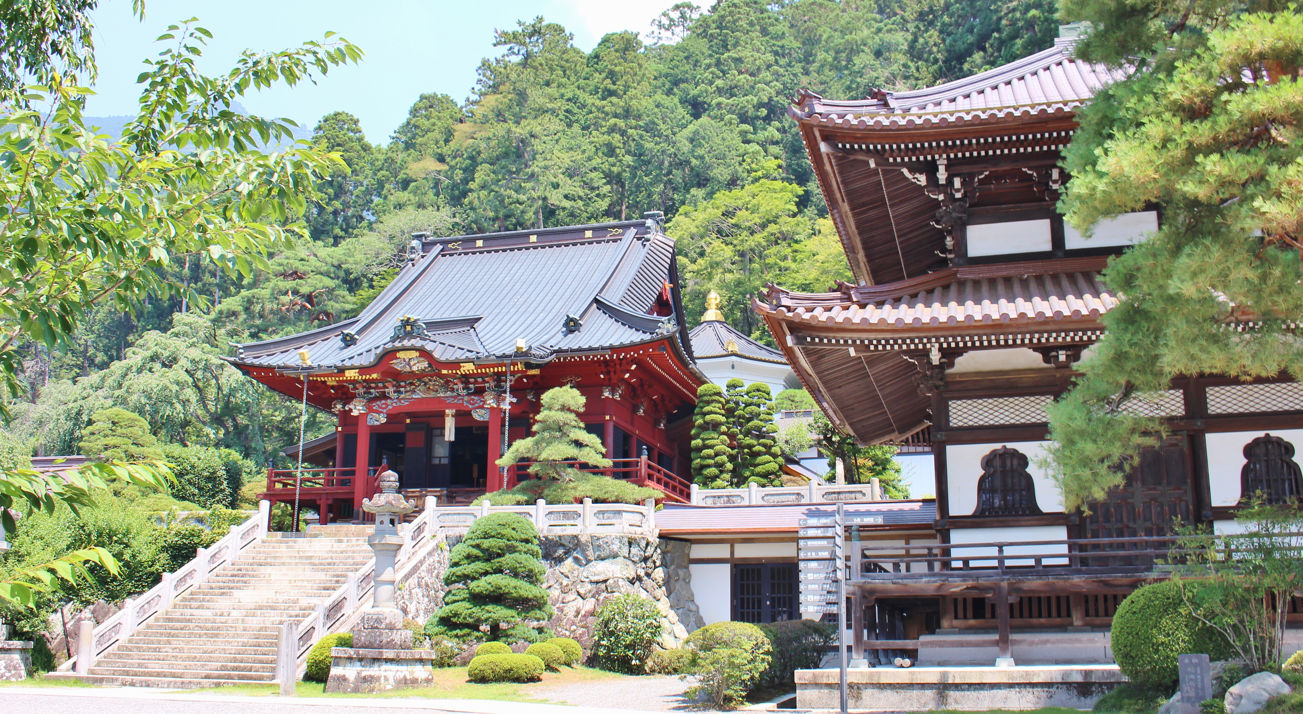 身延山久遠寺